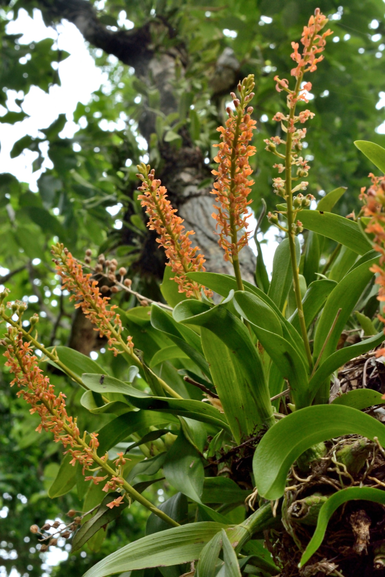 Liparis spec.